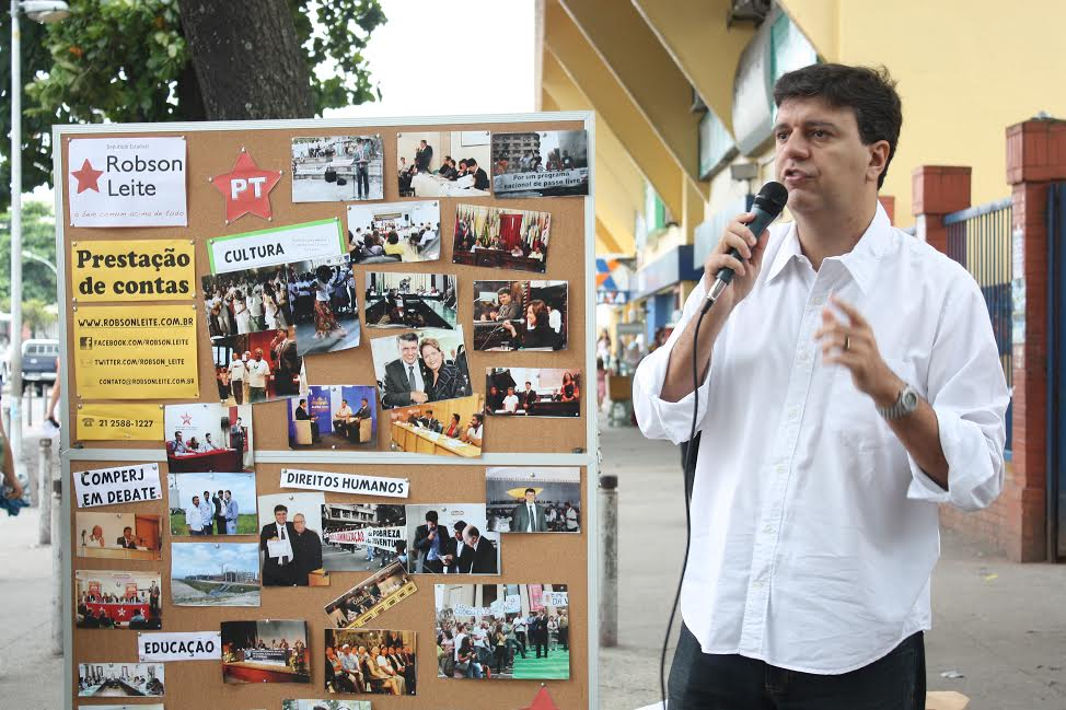 Prestacao de Contas do Mandato Participativo de deputado estadual do Robson Leite